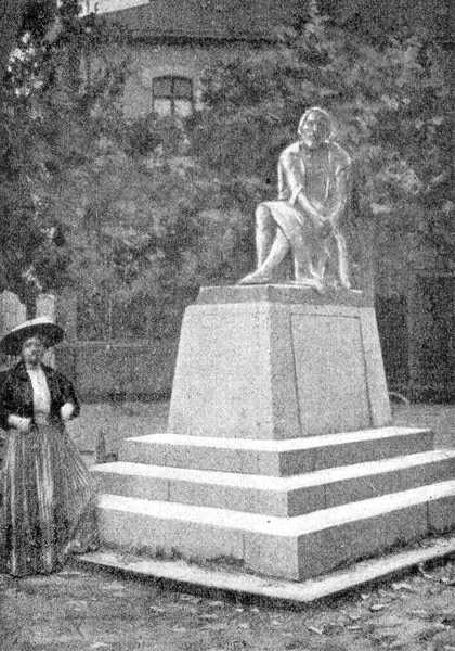 Monument à Miguel Servet, Annemasse, France